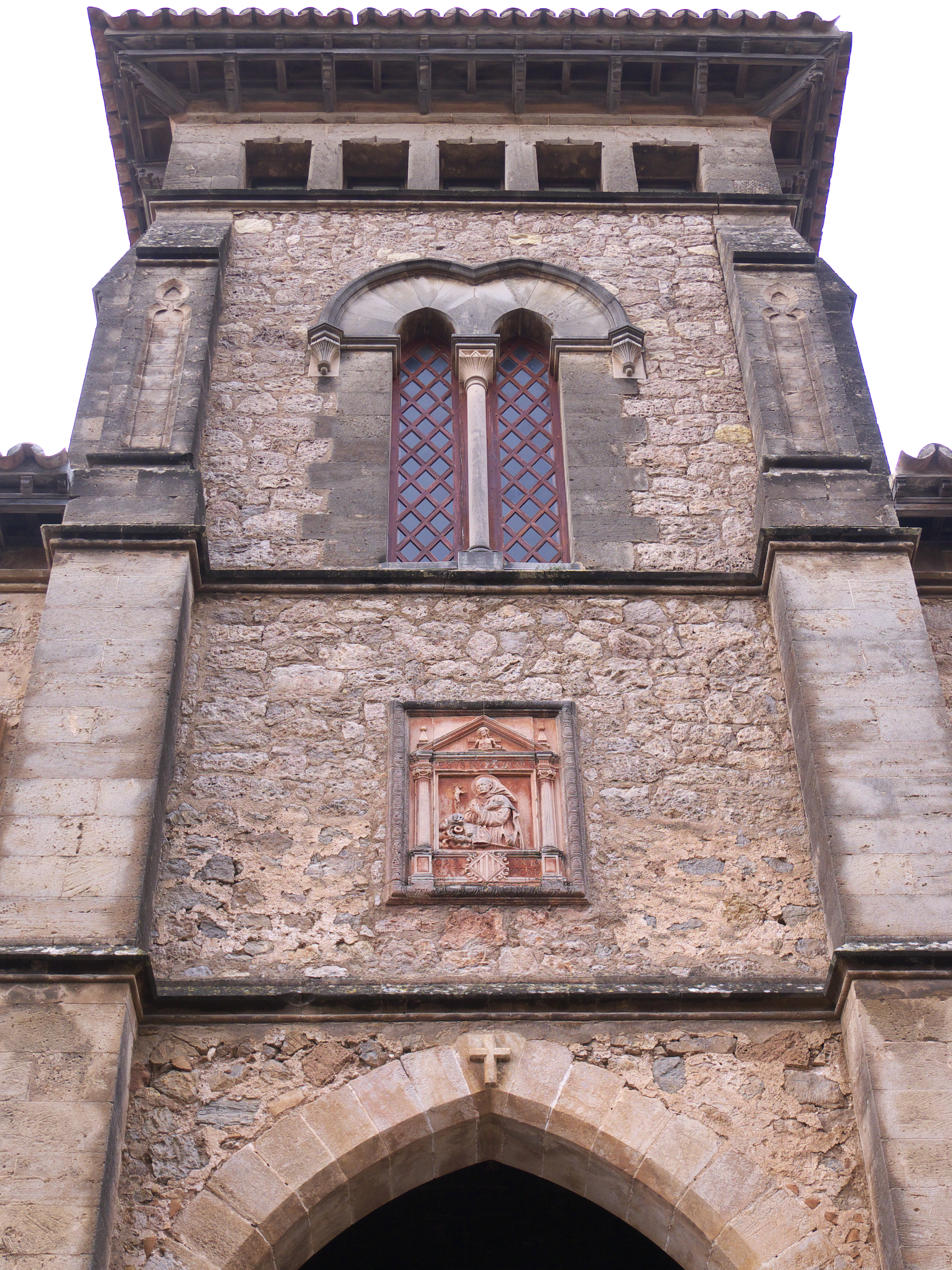 El rey Jaime II de Mallorca situó en este lugar un alcázar para defender esta zona de posibles invasiones. Posteriormente es ampliado con una residencia real.